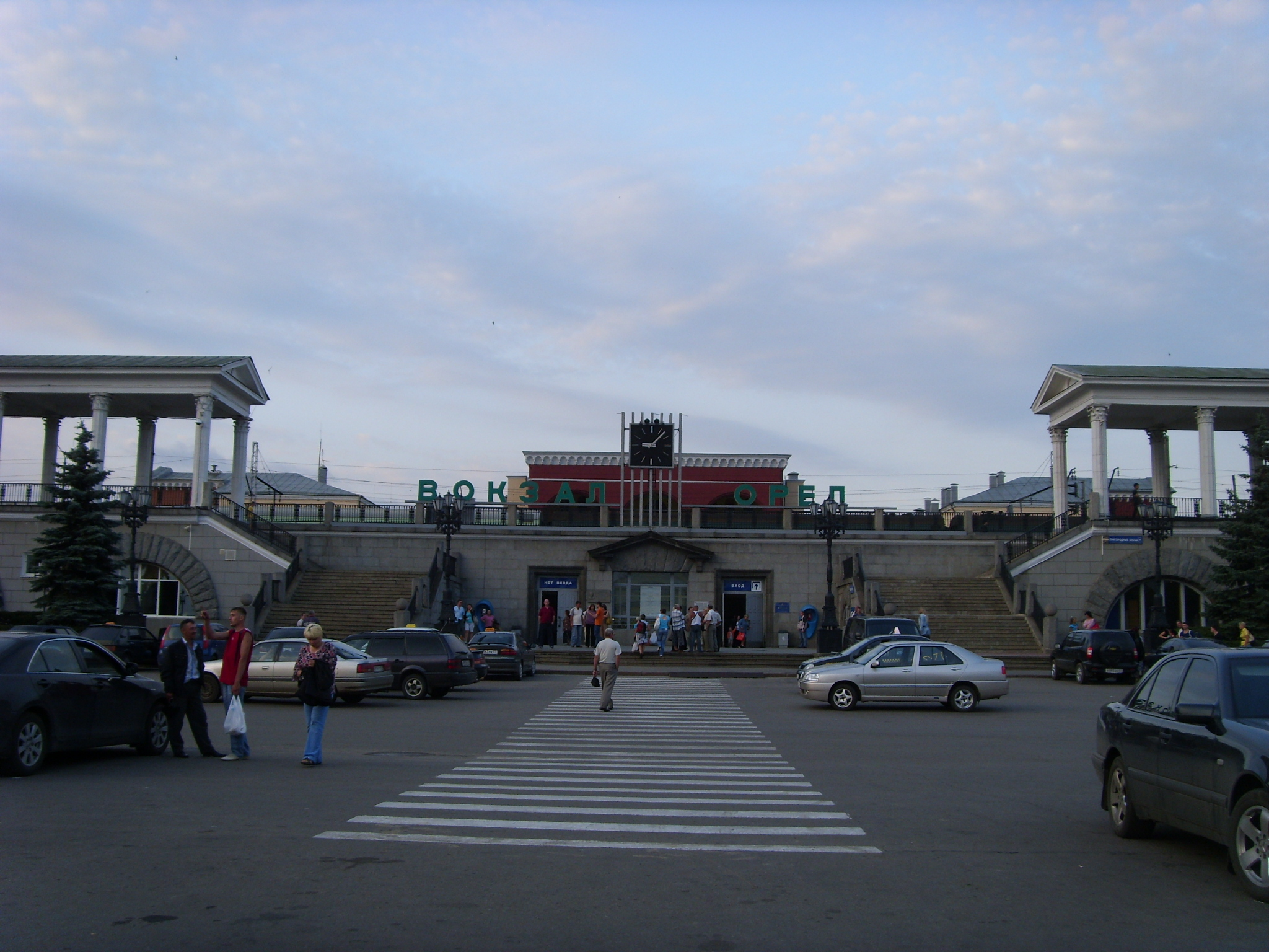 Терминал Вокзала Орёл